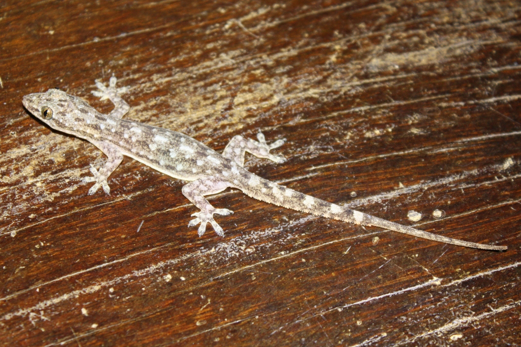 Taken in Tai Po Kau.